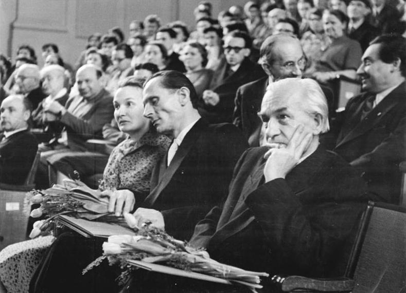 Zentralbild Weiß 27.3.58 „Heinrich-Mann-Preis“ verliehen In einer öffentlichen Plenarsitzung der Deutschen Akademie der Künste in Berlin wurde am 27.3.1958 vom Präsidenten der Akademie, Prof. Otto Nagel, der „Heinrich-Mann-Preis“ für schriftstellerische Arbeiten verliehen. Frau Leonie Mann-Askemzy, die Tochter des Dichters wohnte der Sitzung bei. UBz: Die „Heinrich-Mann-Preisträger“ (v.r.n.l.): Prof. Hans Grundig (II.Klasse), Herbert Jobst ([I. Klasse), Rosemarie Schuder (II. Klasse).